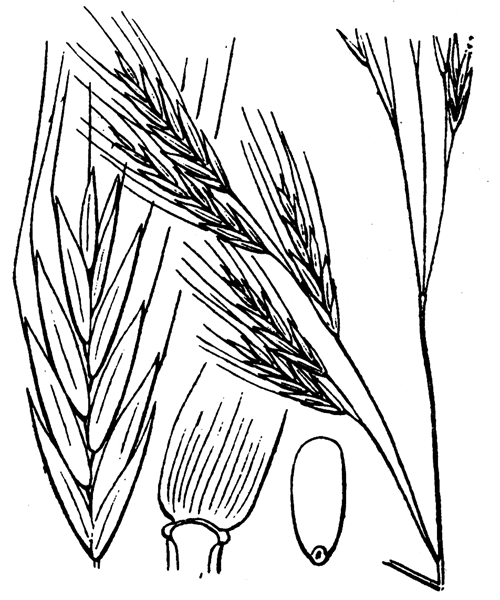 Festuca gigantea